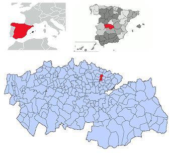 Cedillo del Condado en la provincia de Toledo